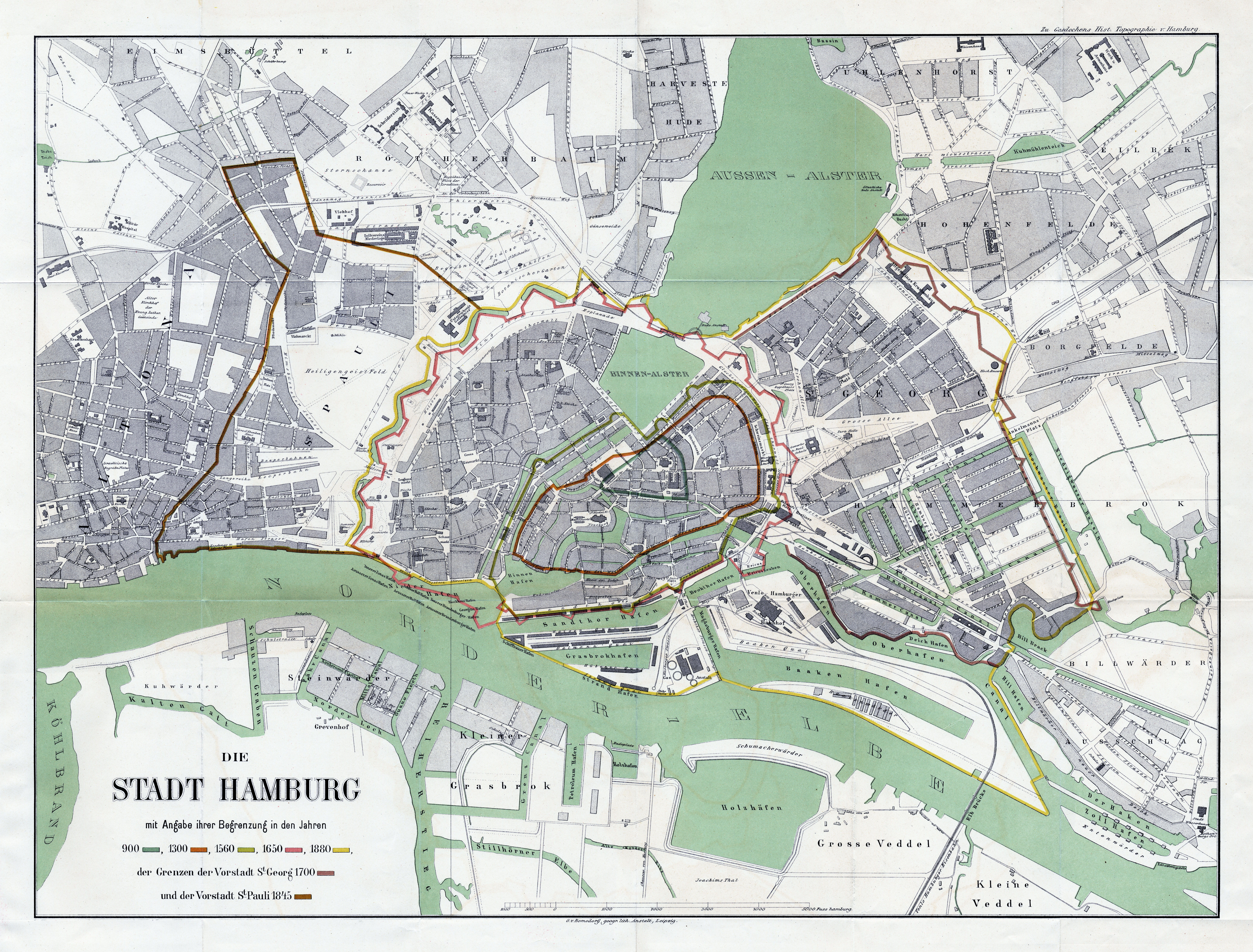 Historische Topographie der Freien und Hansestadt Hamburg..., 1880